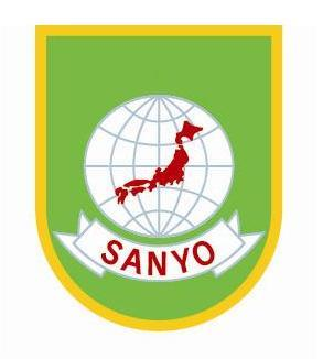 三洋警備保障ロゴマーク